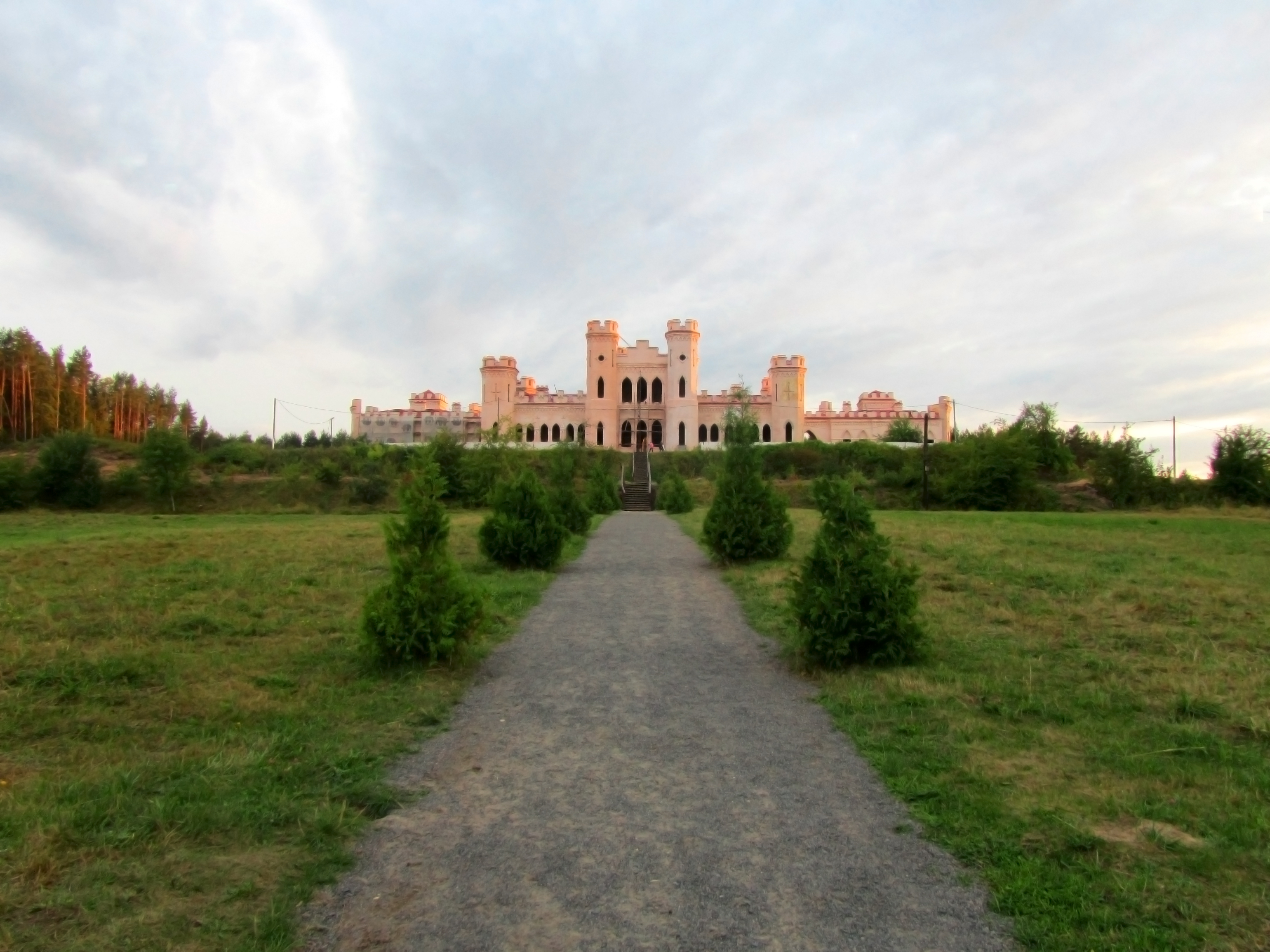 Беларуская (тарашкевіца): Косаўскі палацава-паркавы ансамбль: рэшткі былога палацу Пуслоўскіхмэмарыяльны музэй-сядзіба Т. Касьцюшкіфрагмэнты парку This is a photo of Belarusian heritage monument. Reference number: 111Г000305 ( WLM)